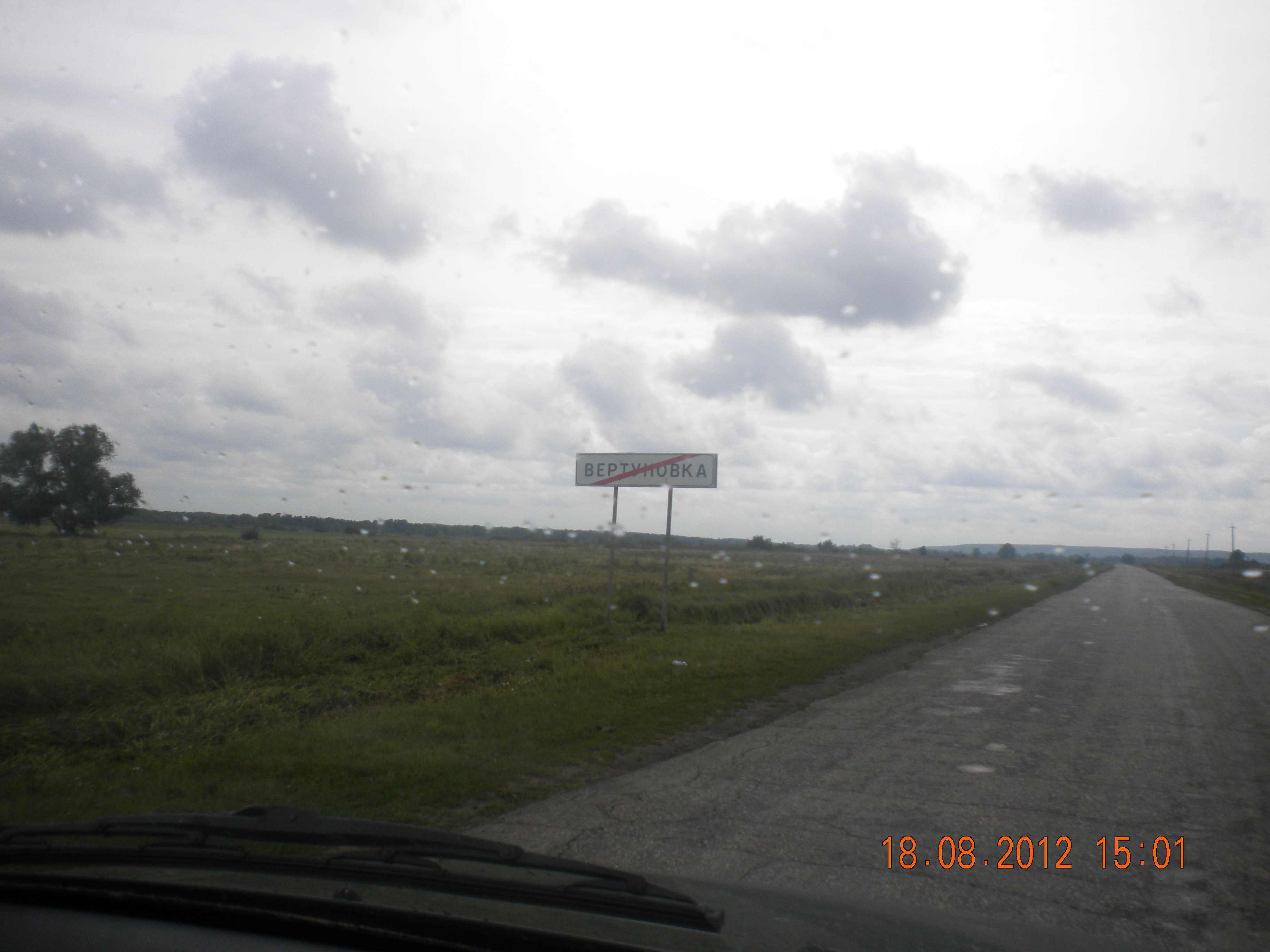 Трасса Беково-Вертуновка-Варварино. 2012 год.